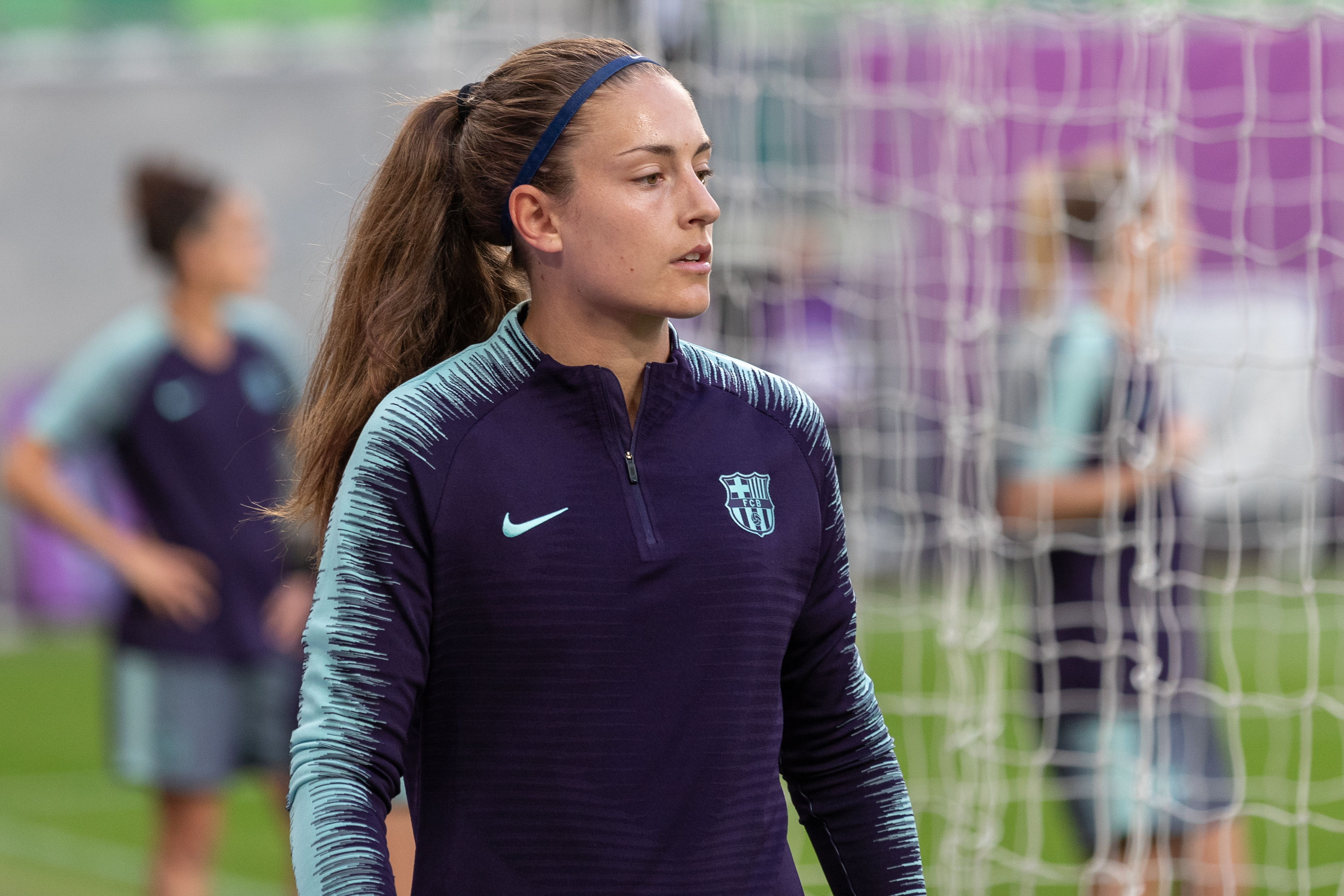 Alexia Putellas (FC Barcelona, 11) beim Abschlusstraining